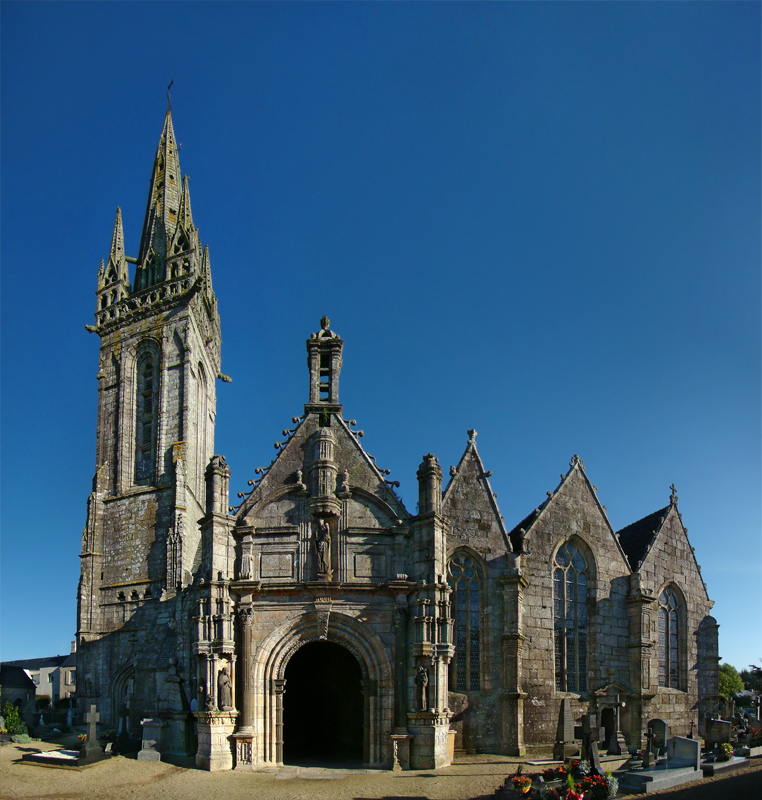 Église Notre-Dame, Bodilis, Finistère, Bretagne, France.